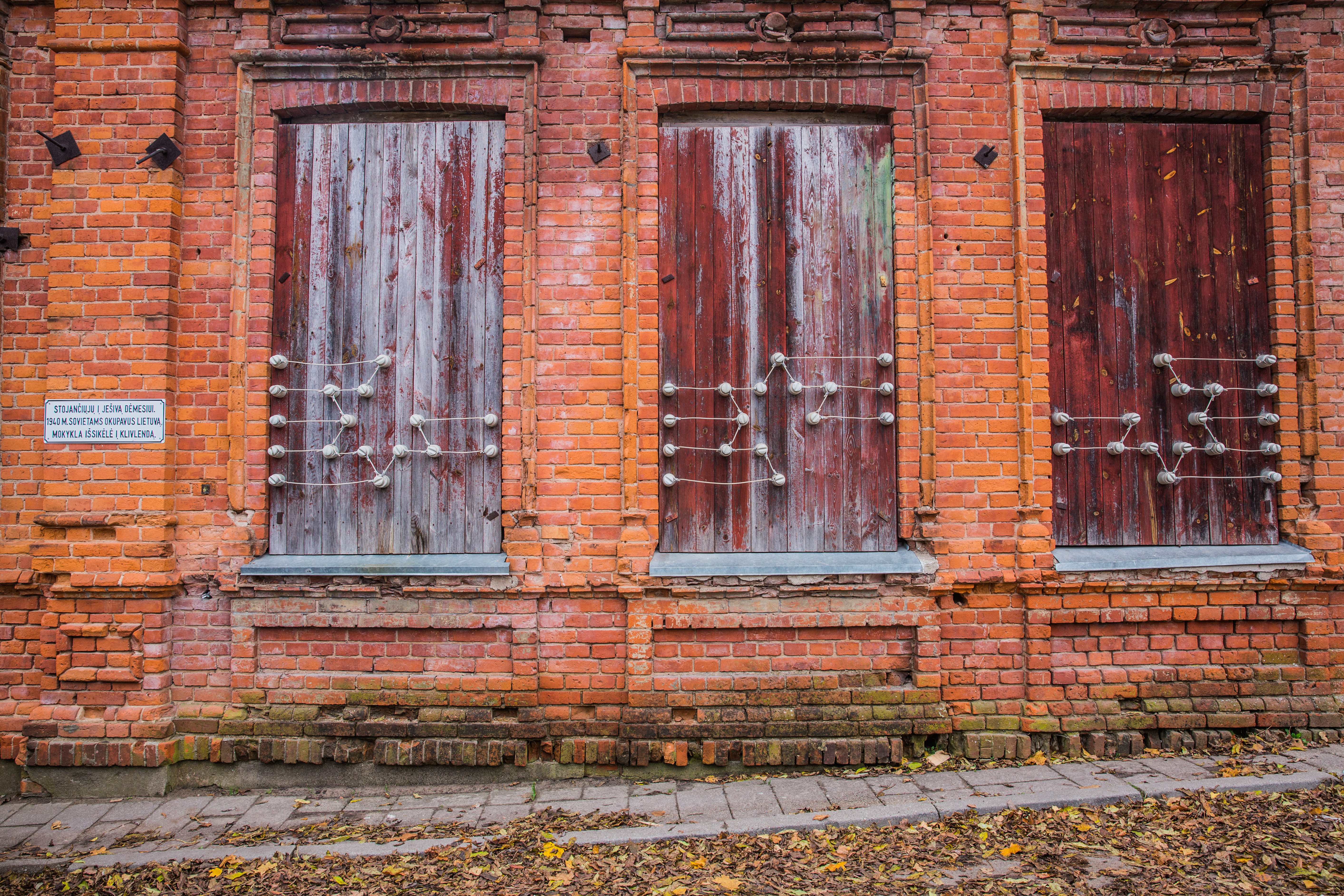 Telšių ješibotas 2